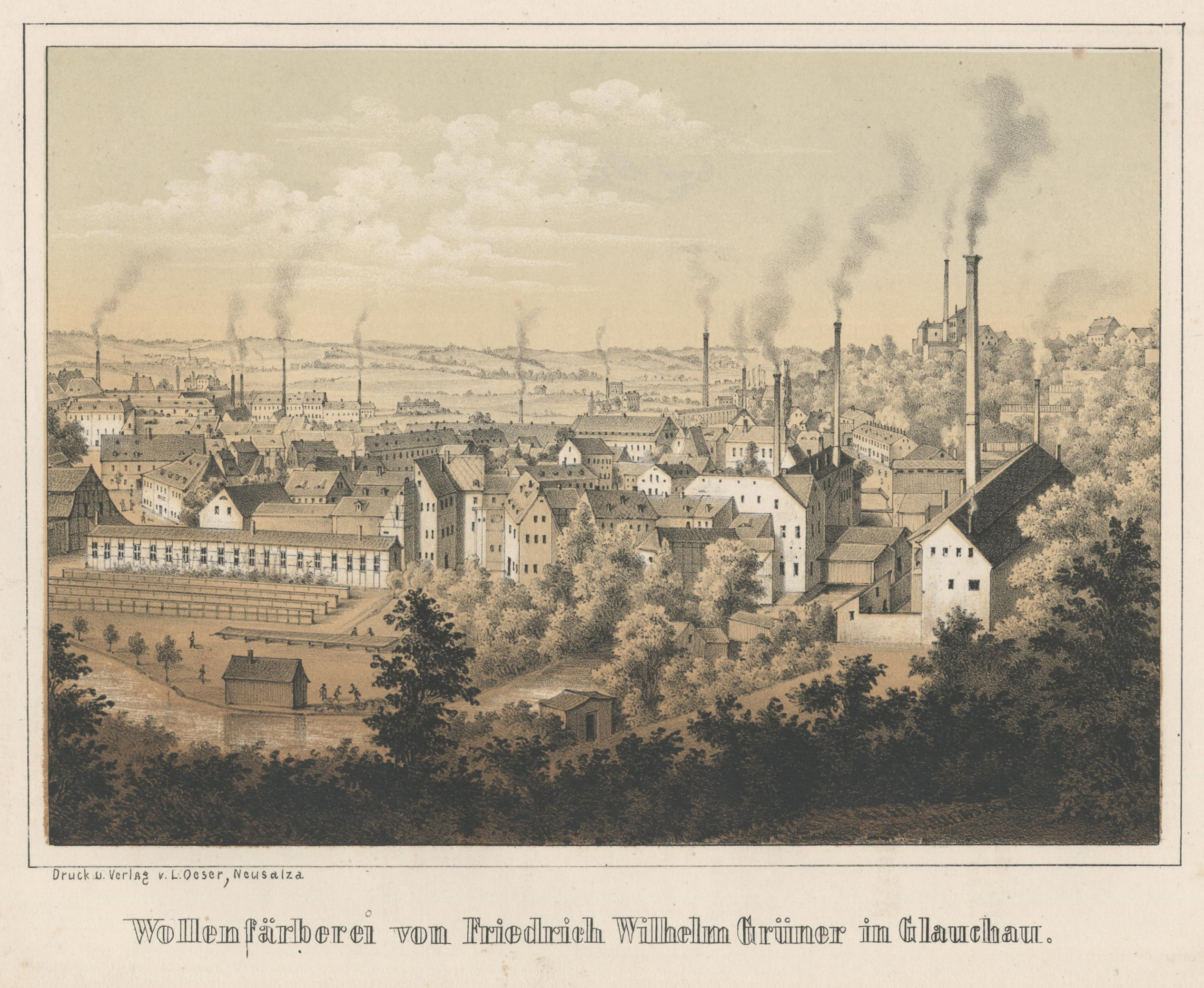 Wollenfärberei von Friedrich Wilhelm Grüner in Glauchau aus: Album der Sächsischen Industrie Erster Band